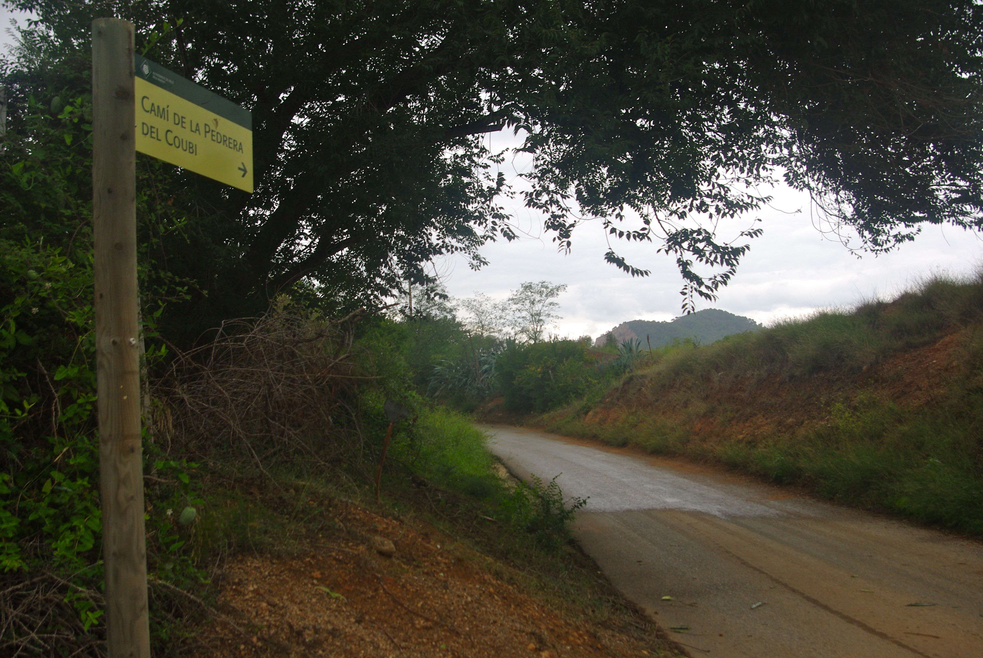 El Camí de la Pedrera del Coubi al terme de Reus